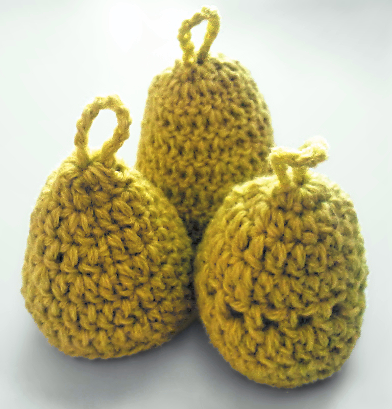 Eierwärmer (Eierhauben), aus Strickgarn gehäkelt (Handarbeit).